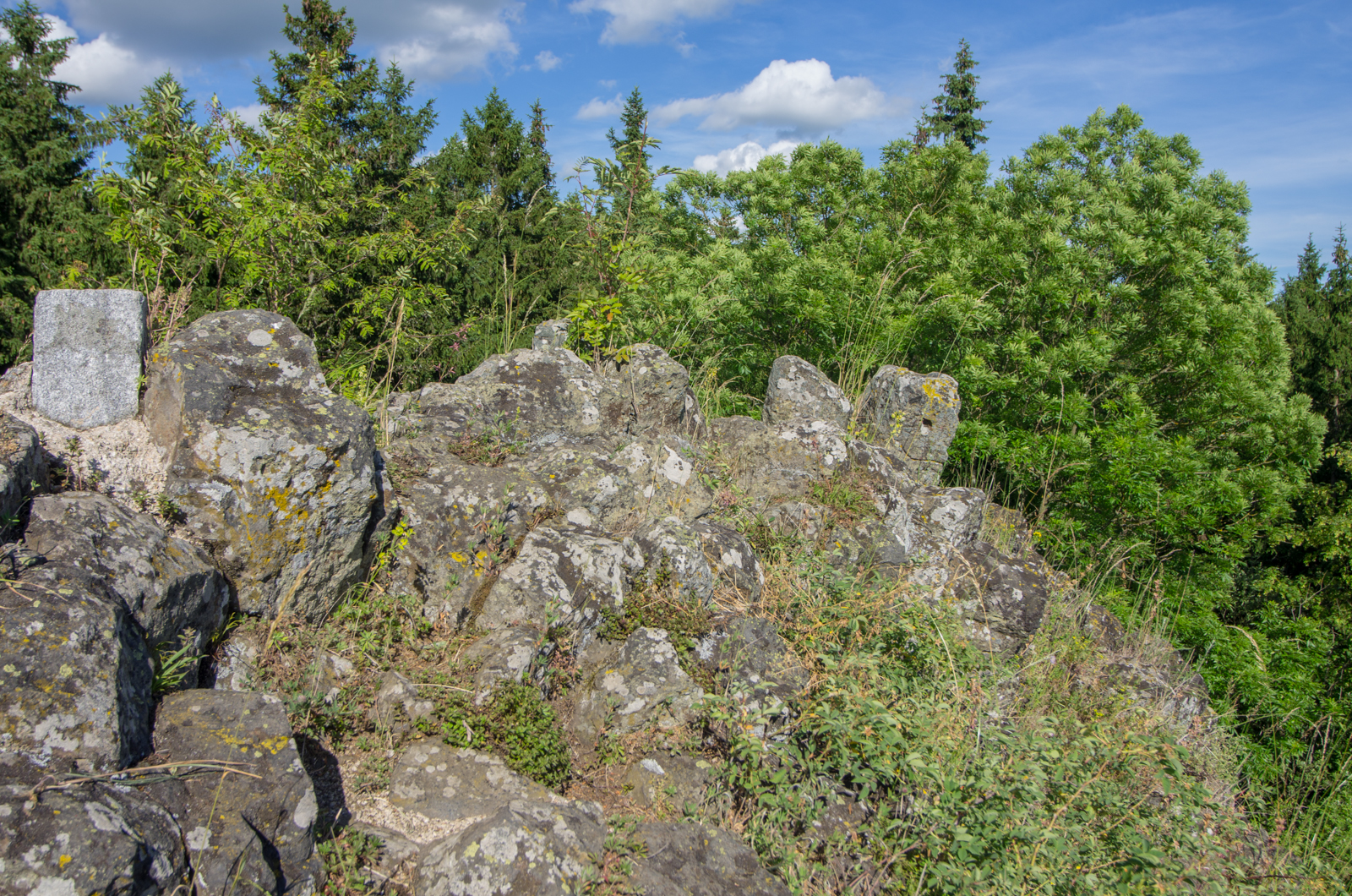 Přírodní památka Homolka, vrch Kupa (695 m), Chodov u Bečova nad Teplou, Slavkovský les, okres Karlovy Vary